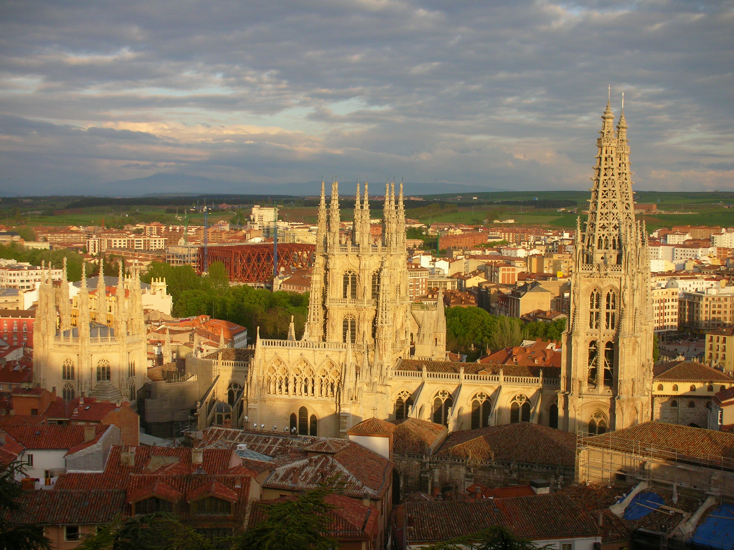 Catedral de Burgos, desde el parador ubicado cerca del castillo de la misma ciudad